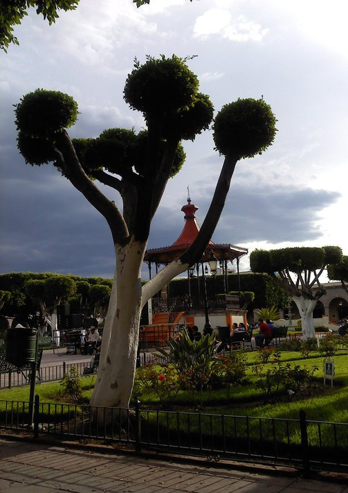 Jardin de Uriangato